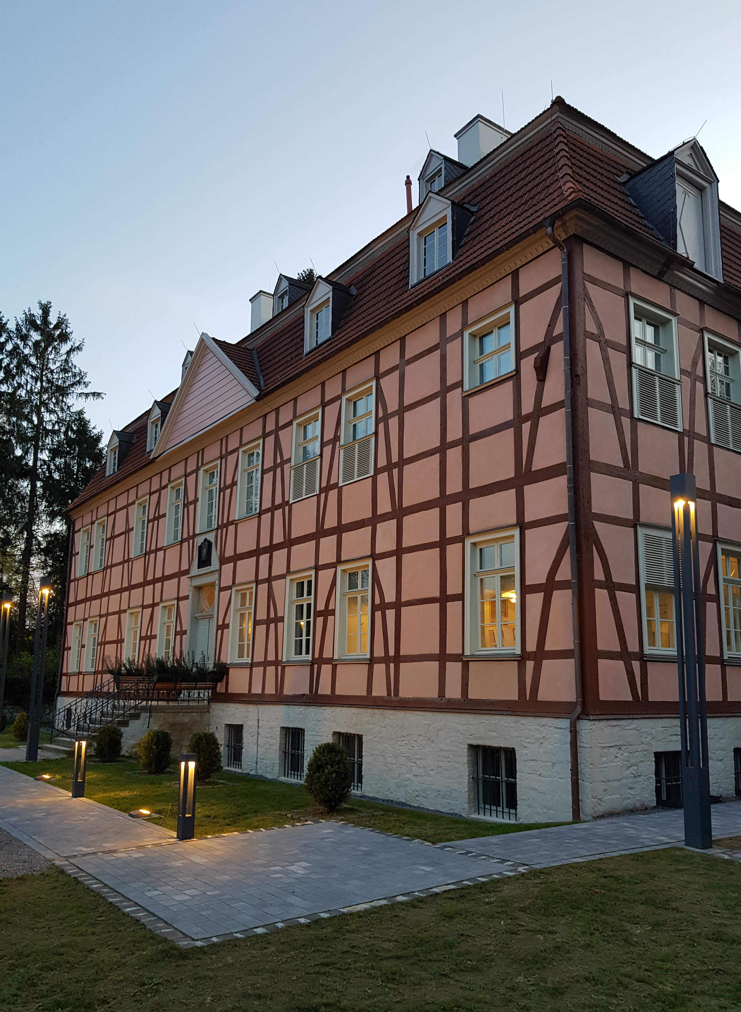 Herrenhaus Gut Rödinghausen, Fischkuhle 15 in Menden (Sauerland). This image shows a heritage building in Germany, located in the North Rhine-Westphalian city Menden (Sauerland) (no. 26).